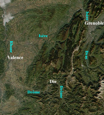 Satellitenaufnahme des Vercors